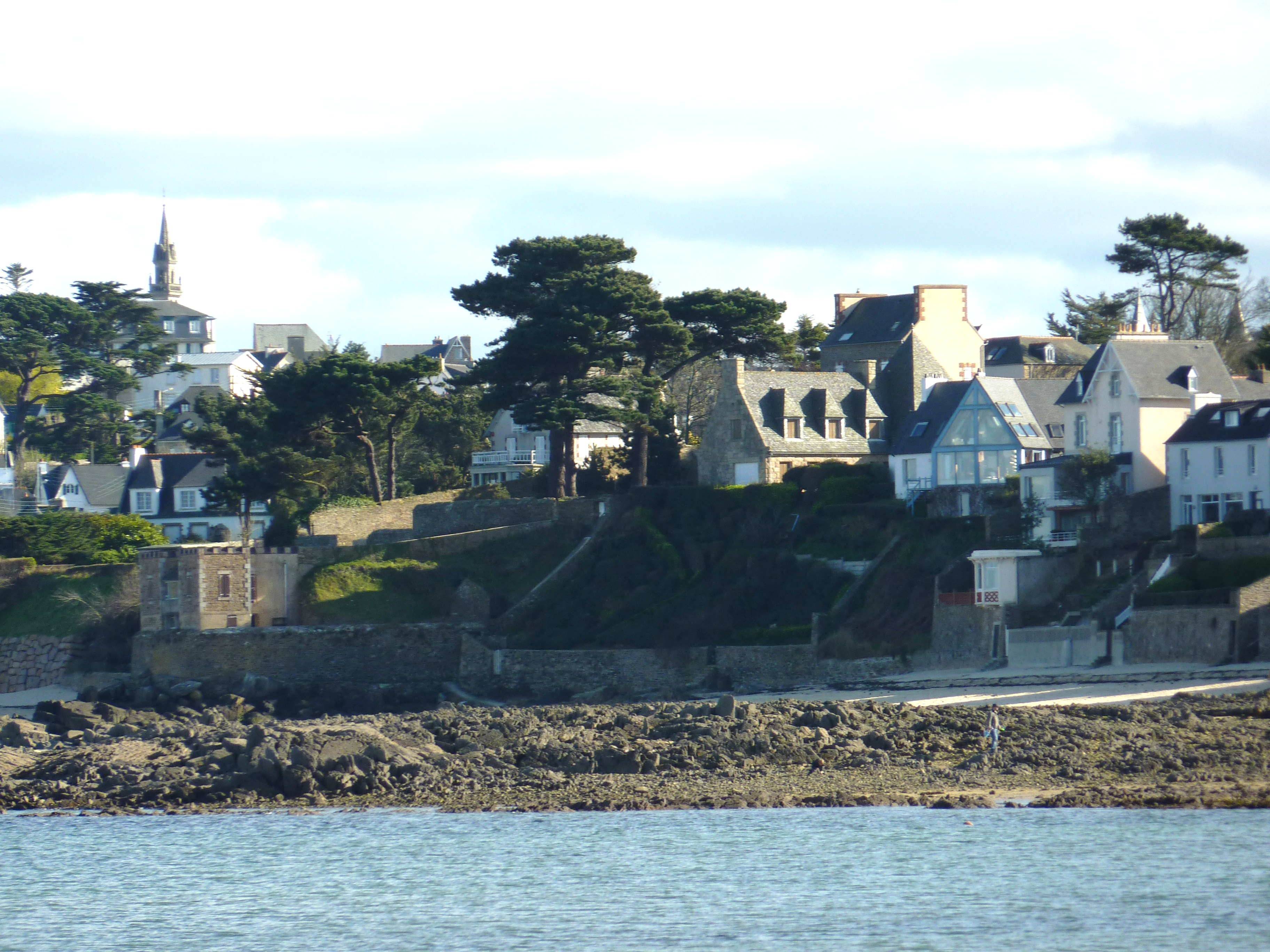 Carantec vu depuis la plage menant à l'île Callot